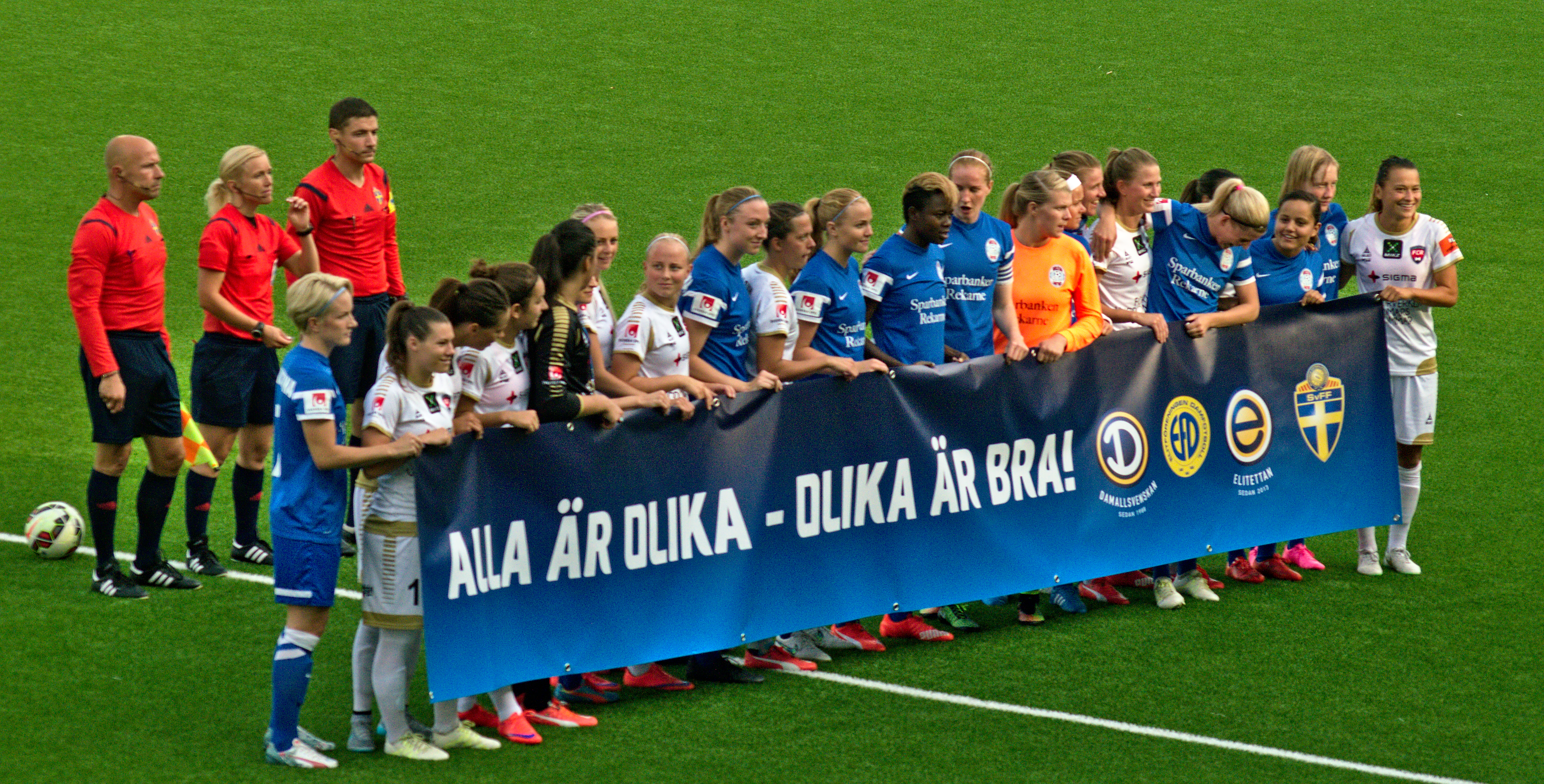 Eskilstuna United - FC Rosengård, Tunavallen i Eskilstuna 5 augusti 2015. Startelvor.